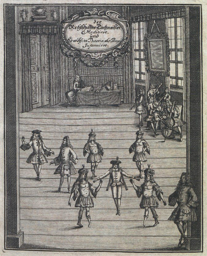 Title page of Gottfried Tauberts Rechtschaffener Tantzmeister